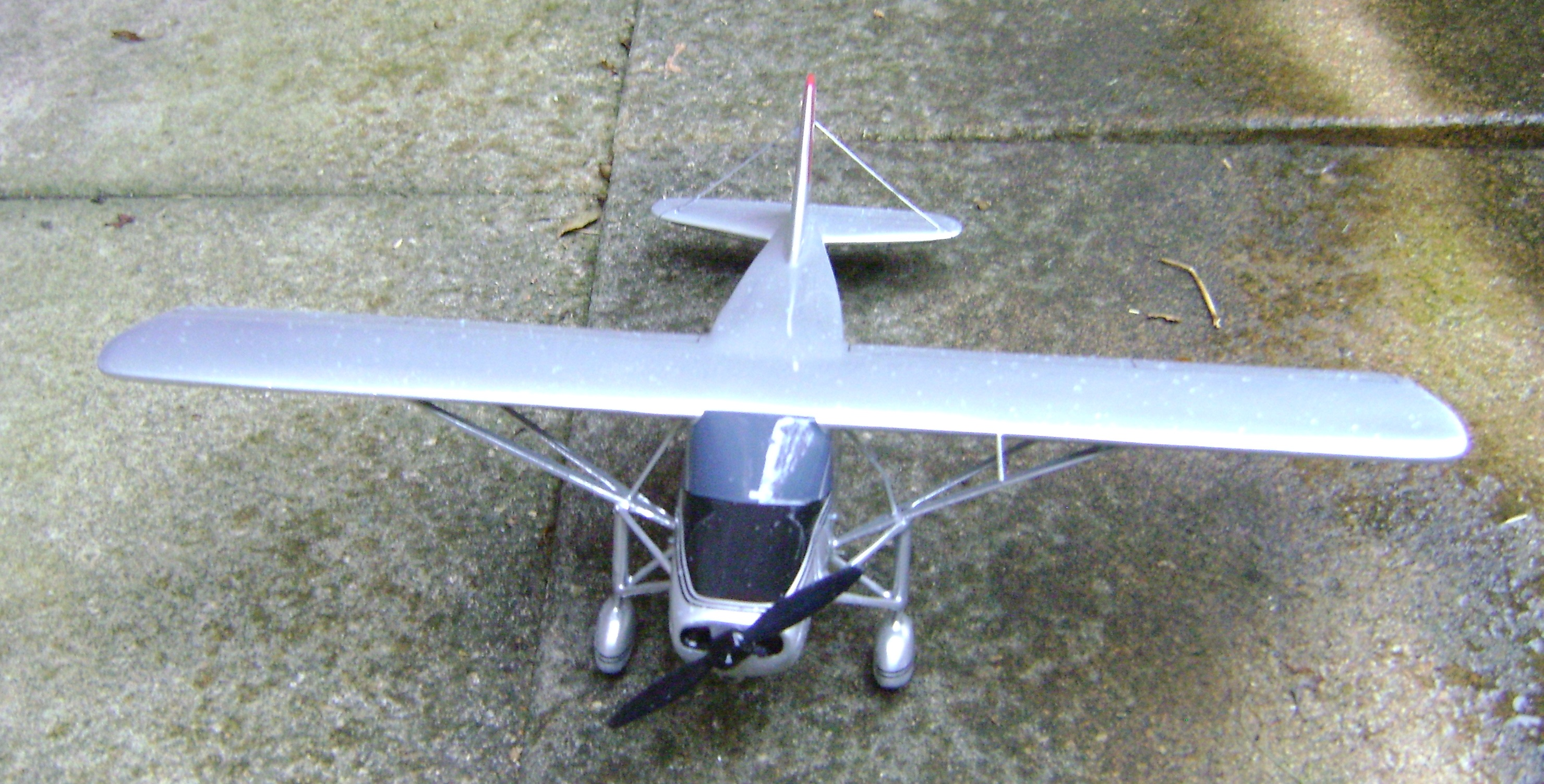 PilatusP4 front